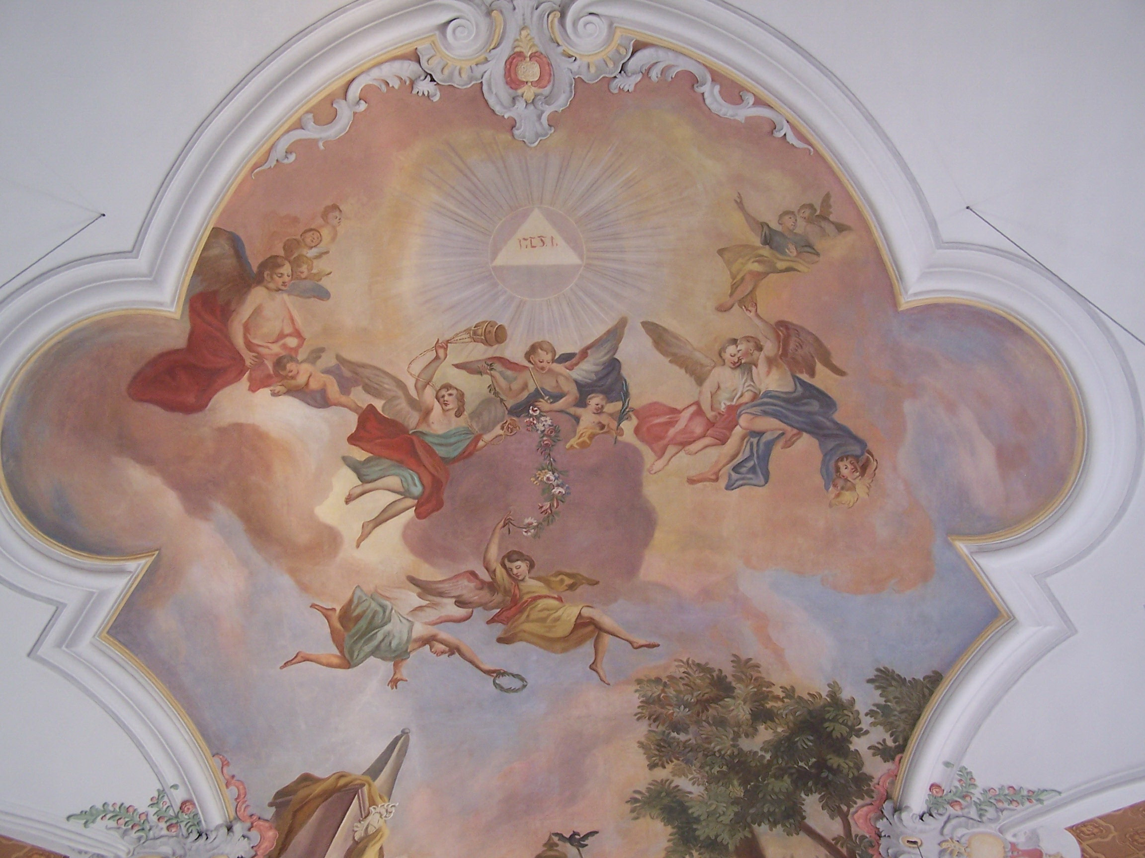 Unterneuhausen, Kirchweg 9. Saalkirche mit Westturm, barocke Anlage von 1741, mit Lisenengliederung. Das große Deckenfresko im Kirchenschiff zeigt das Matyrium des Hl. Laurentius. Im oberen Teil steht der Himmel offen. Engel erwarten den Heiligen.